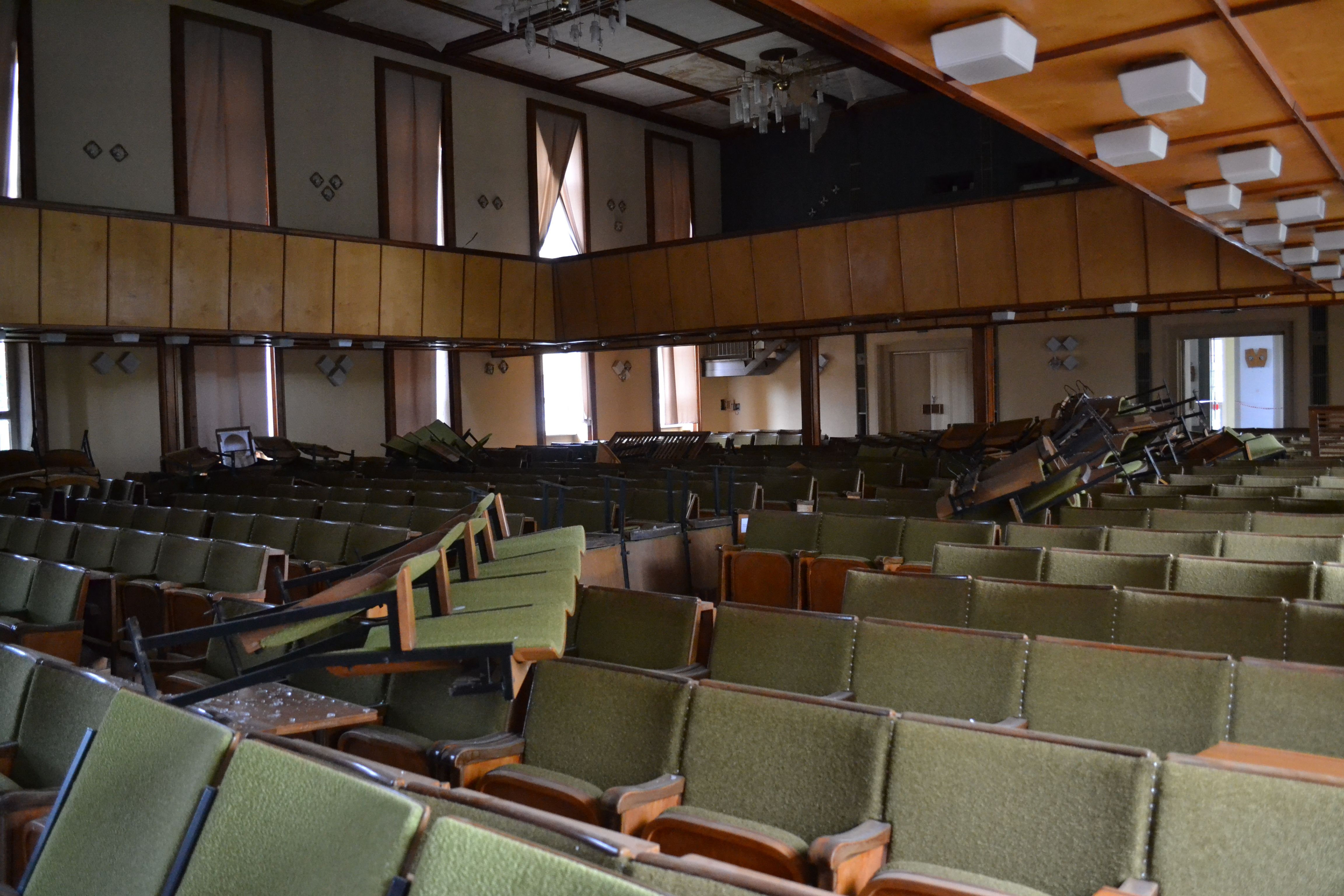 Bild des aktuellen Vandalismus des leerstehenden Gebäudes